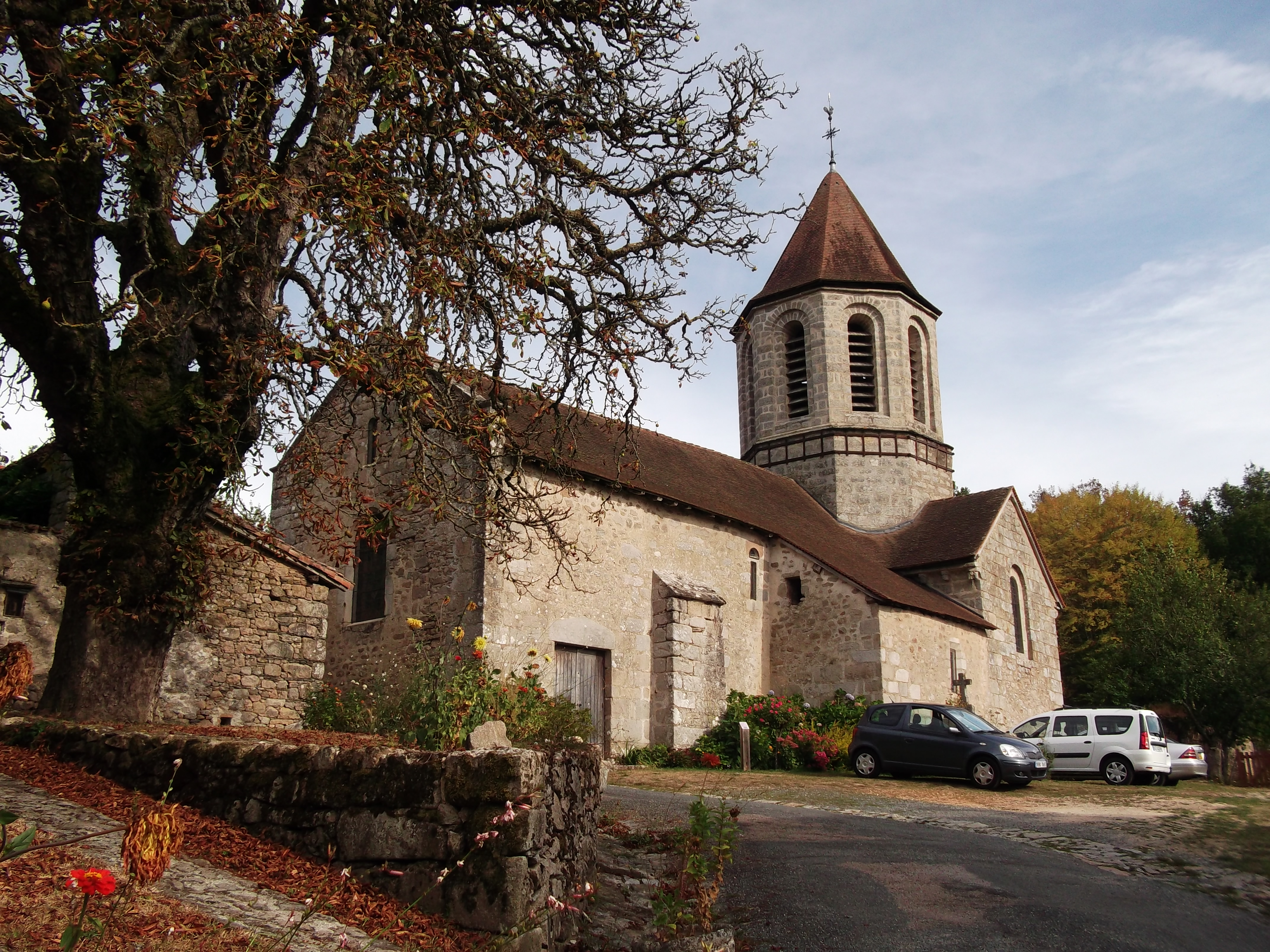 Église Saint-Hilaire de Saint-Hilaire-les-Places, (Inscrit, 1973) .